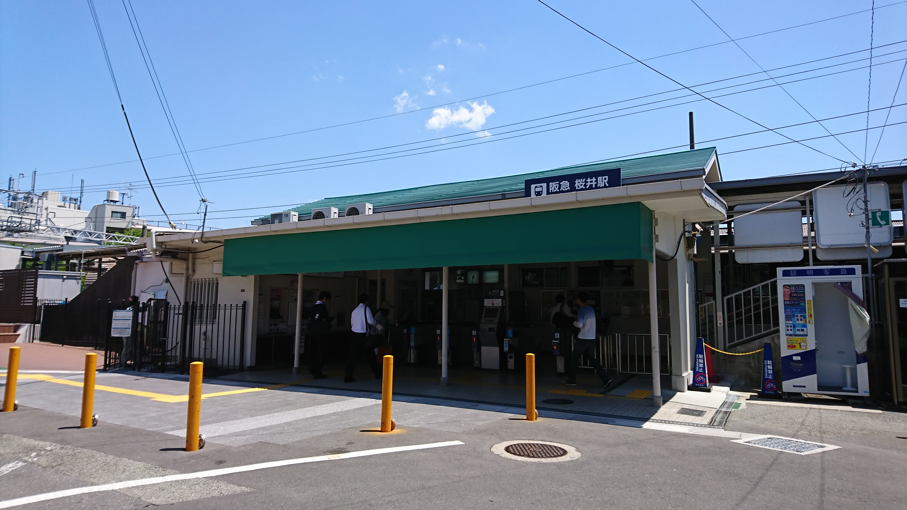 阪急桜井駅 駅舎